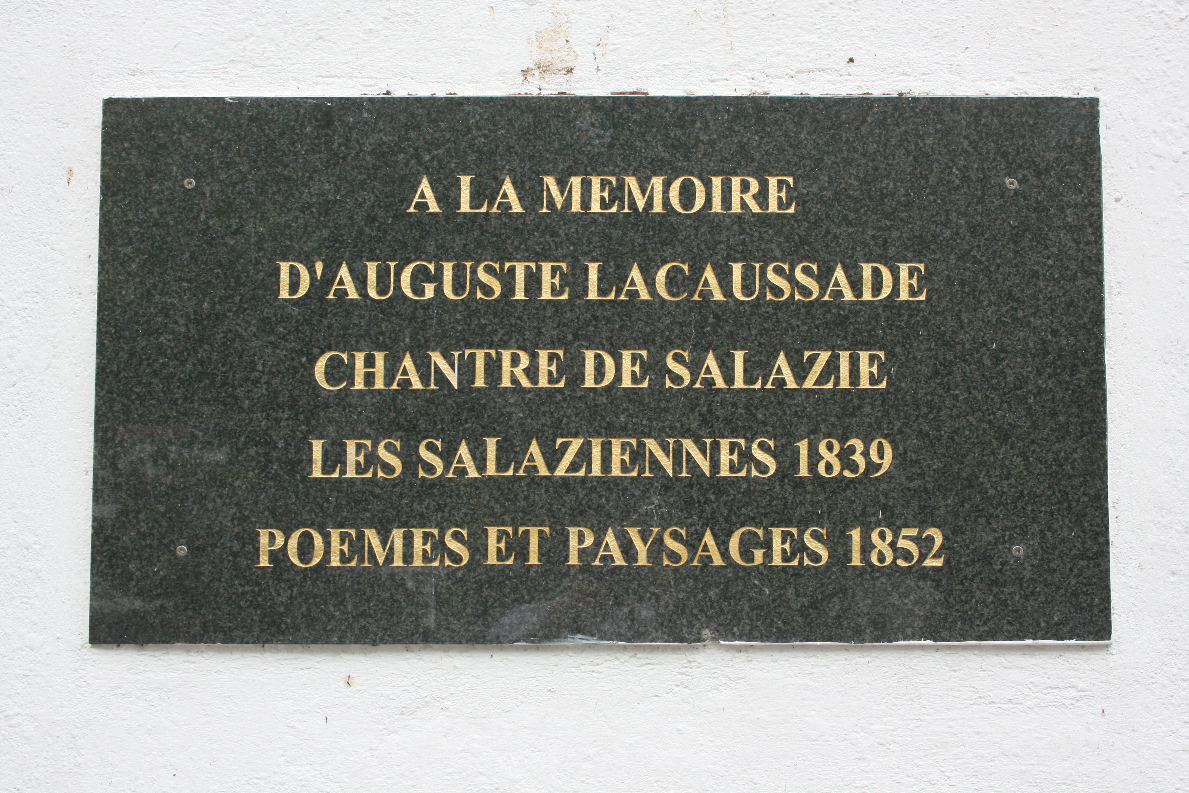 Plaque célébrant la mémoire d'Auguste Lacaussade à Hell-Bourg, dans les Hauts de la Réunion